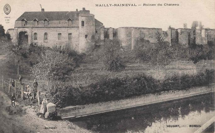 Mailly-Raineval avant guerre (14-18)